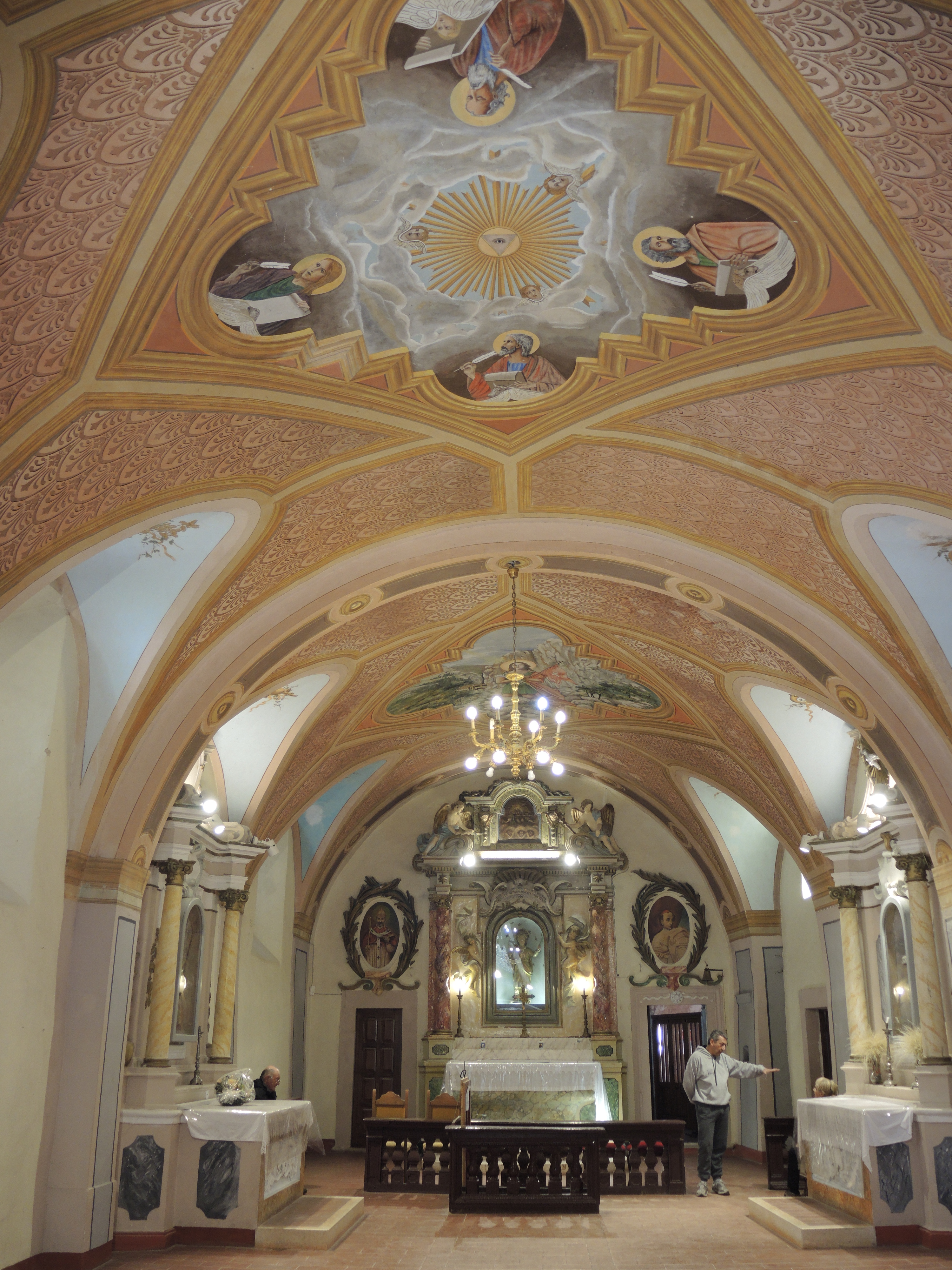 Eremo di San Venanzio